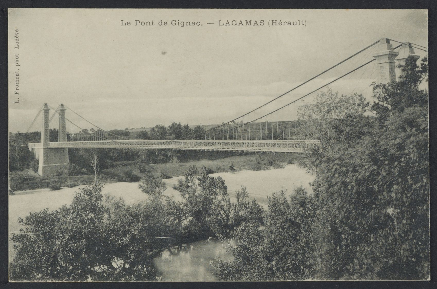 Lagamas. - Le Pont de Gignac : carte postale, 1ère moitié du XXe siècle